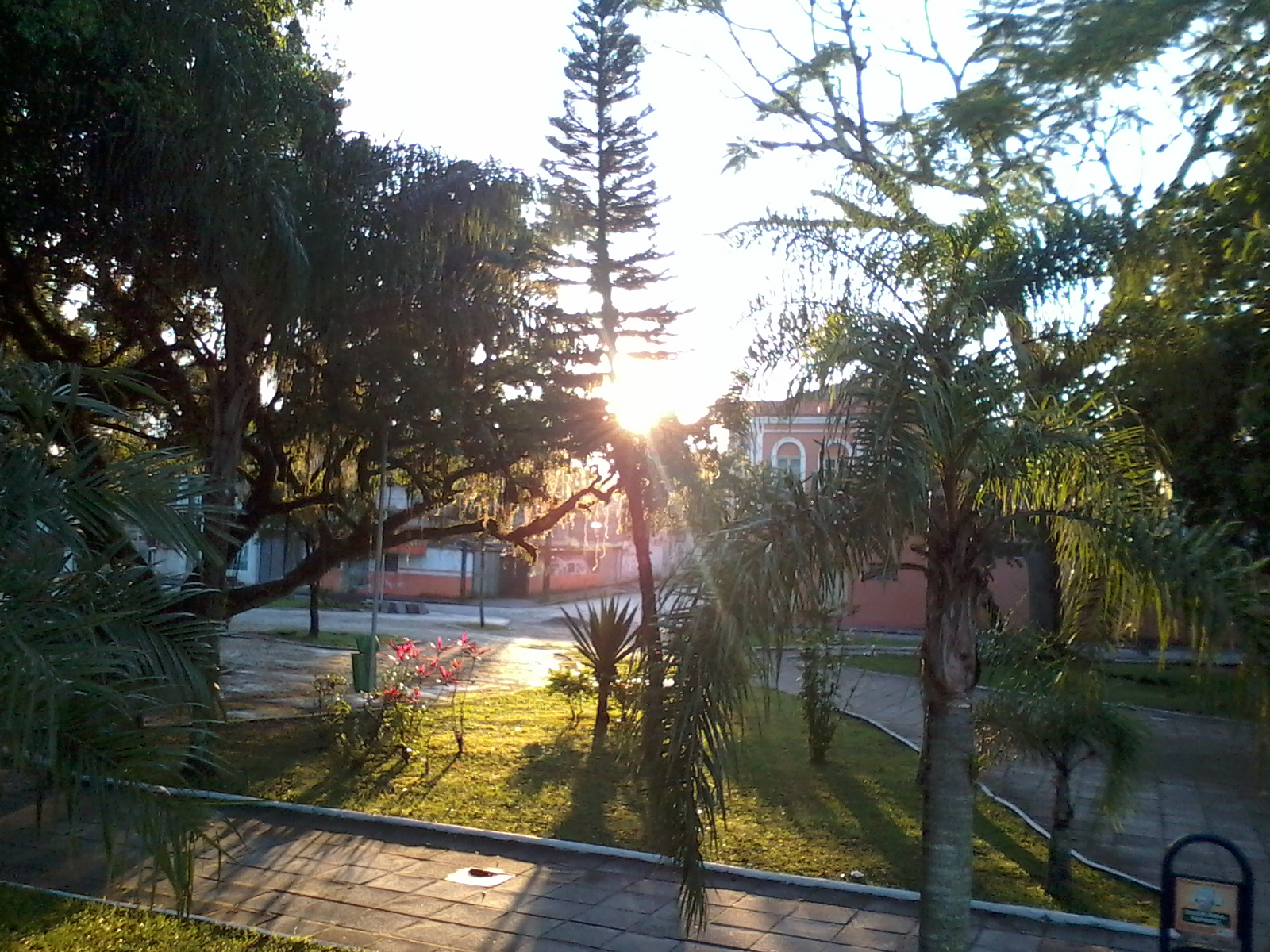 Logo de manhã momento clicado na praça dos leões em Paranaguá